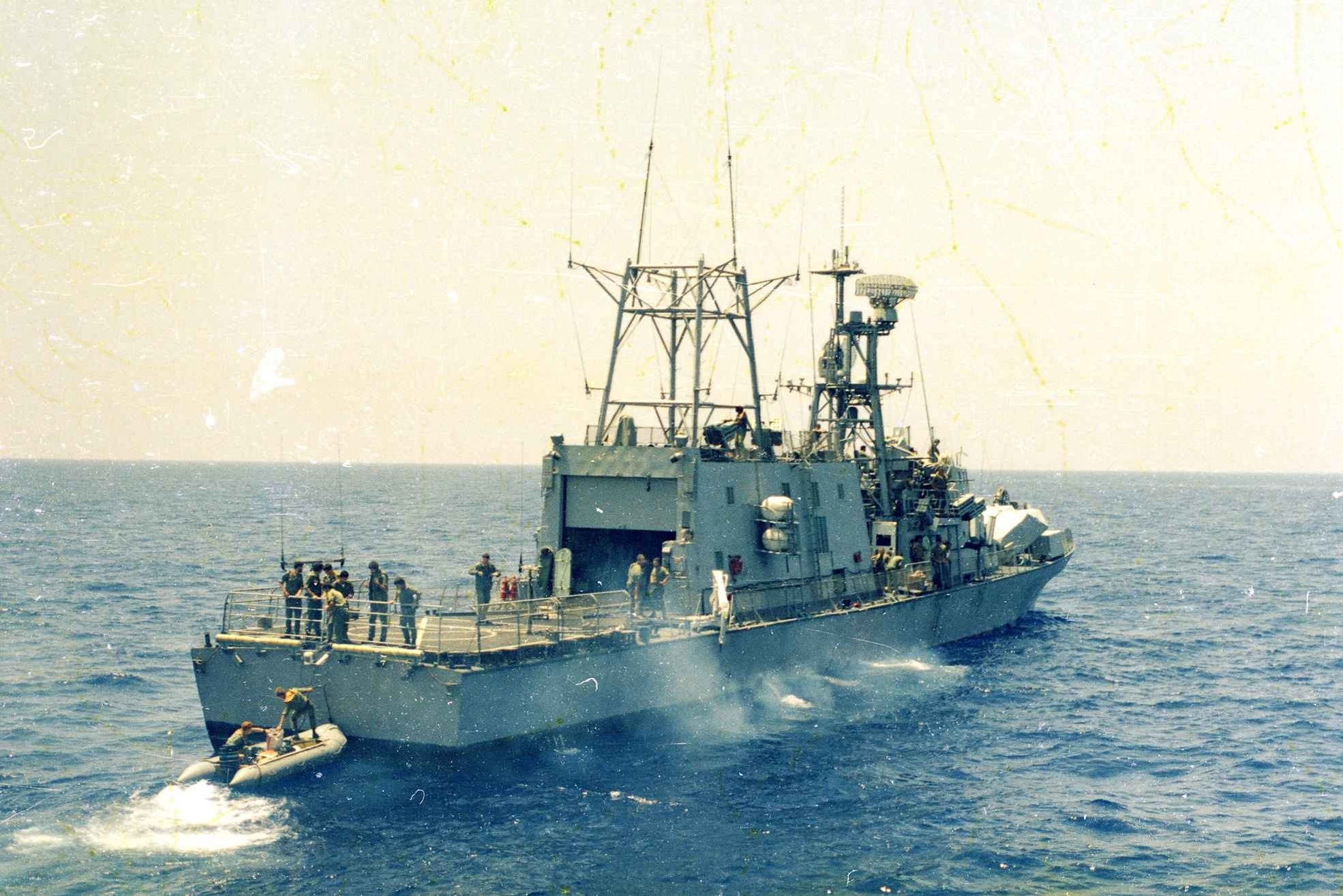 אח"י גאולה ספינת הפיקוד במלחמת שלום הגליל